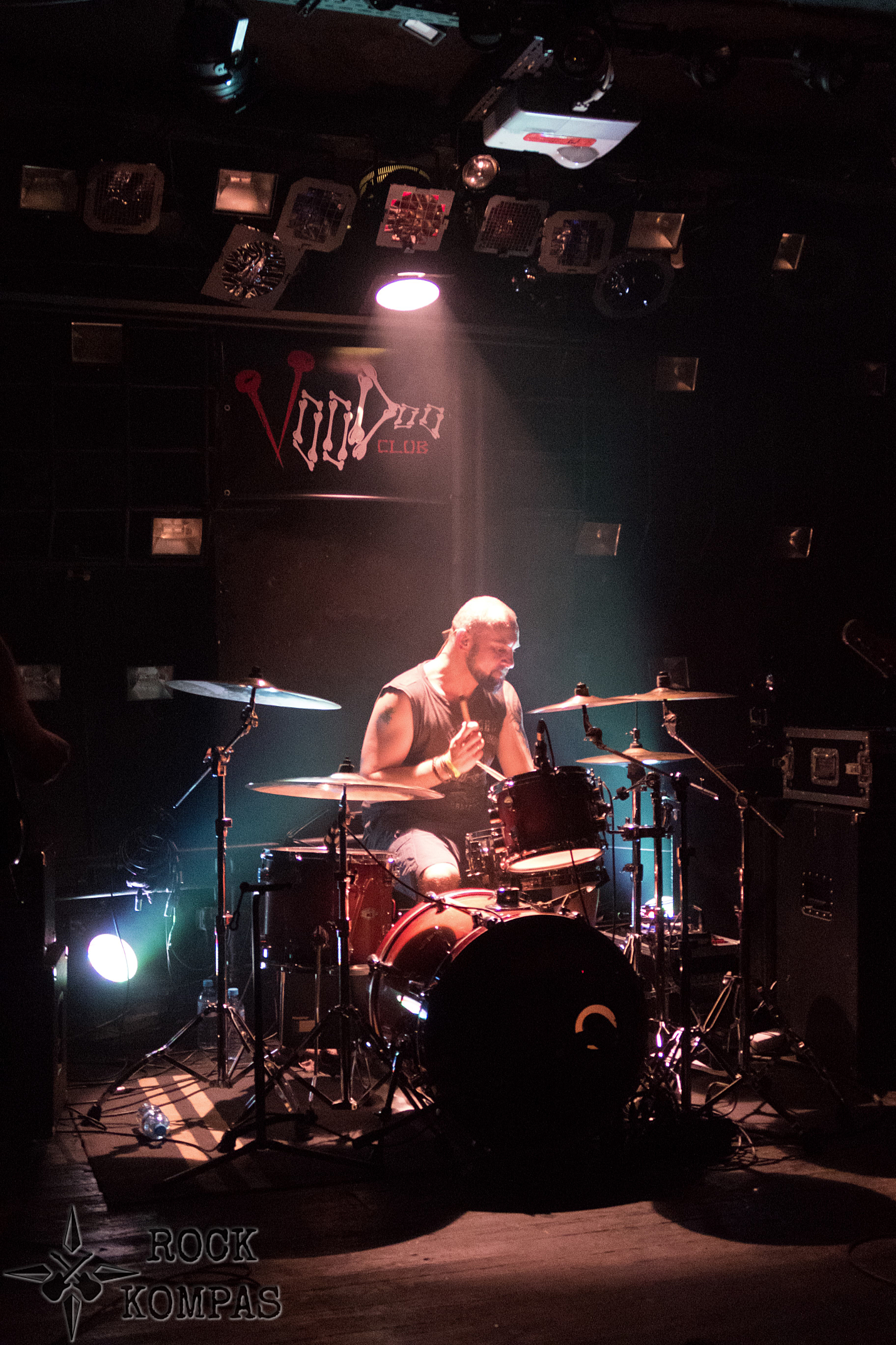 2019 Warszawa, klub Voo Doo